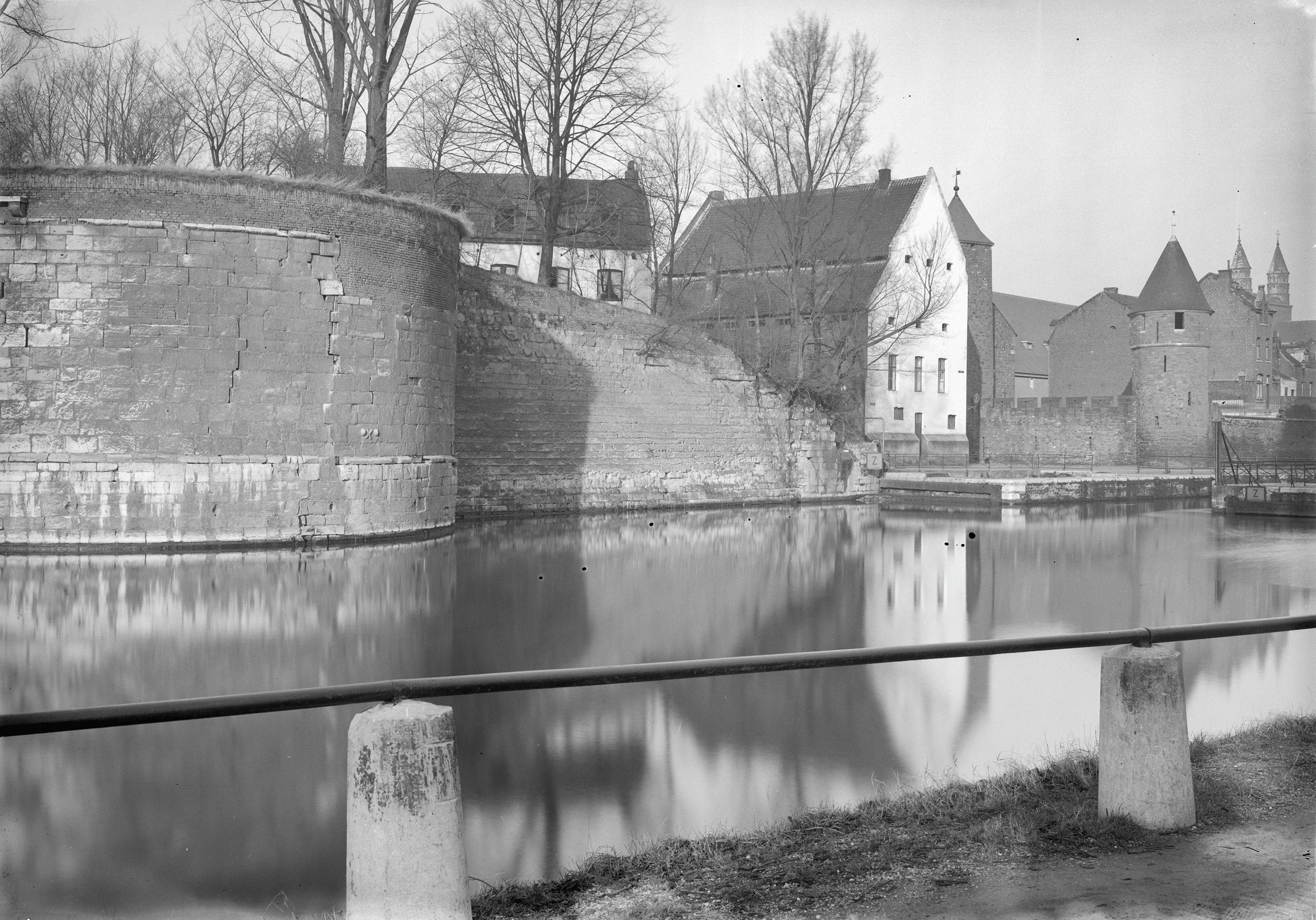 Molens: papiermolen "de Ancker"